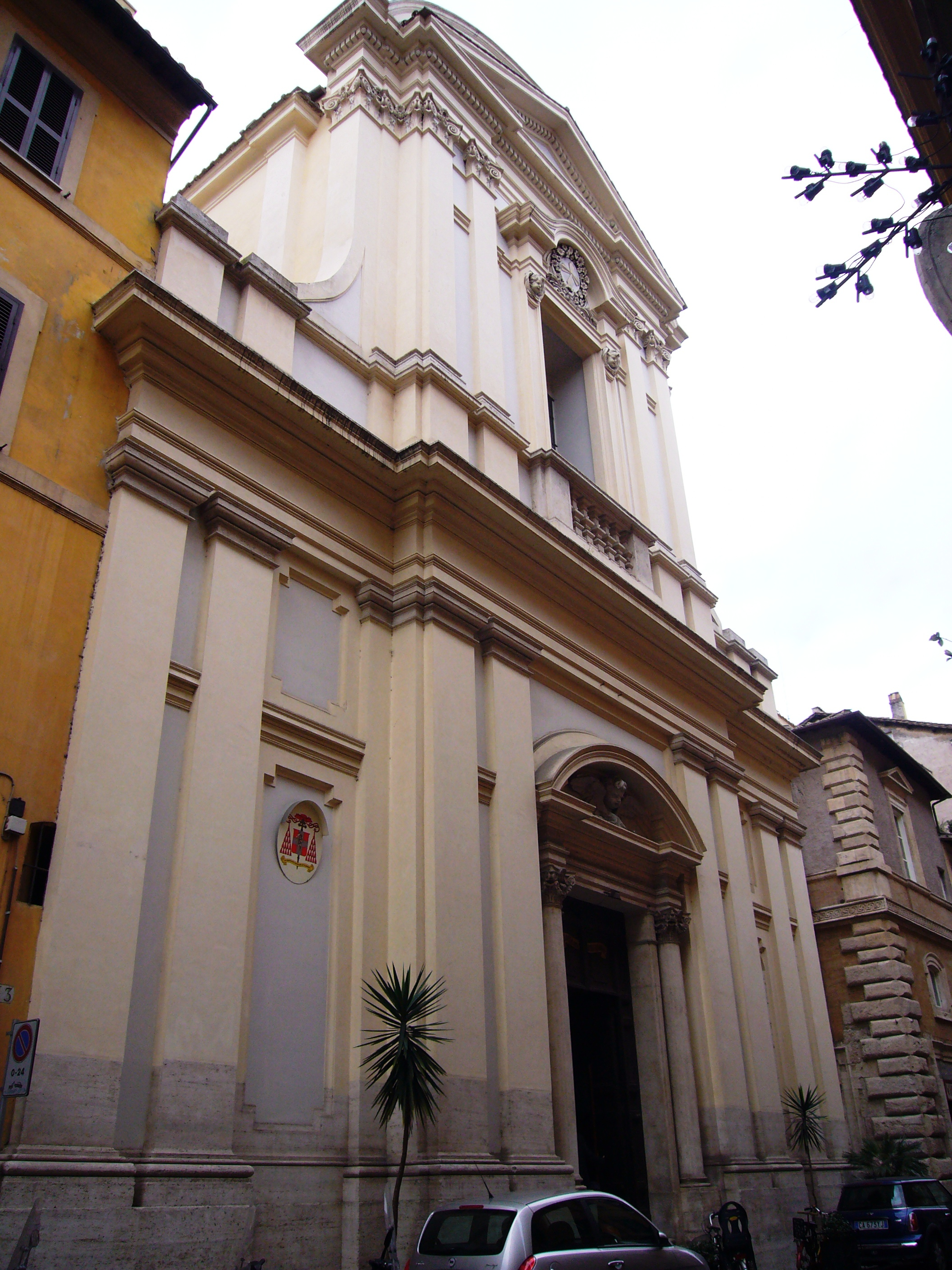 Roma, Santa Lucia del Gonfalone (rione Regola)